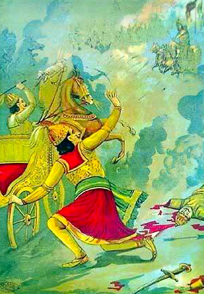 Karna Vadh